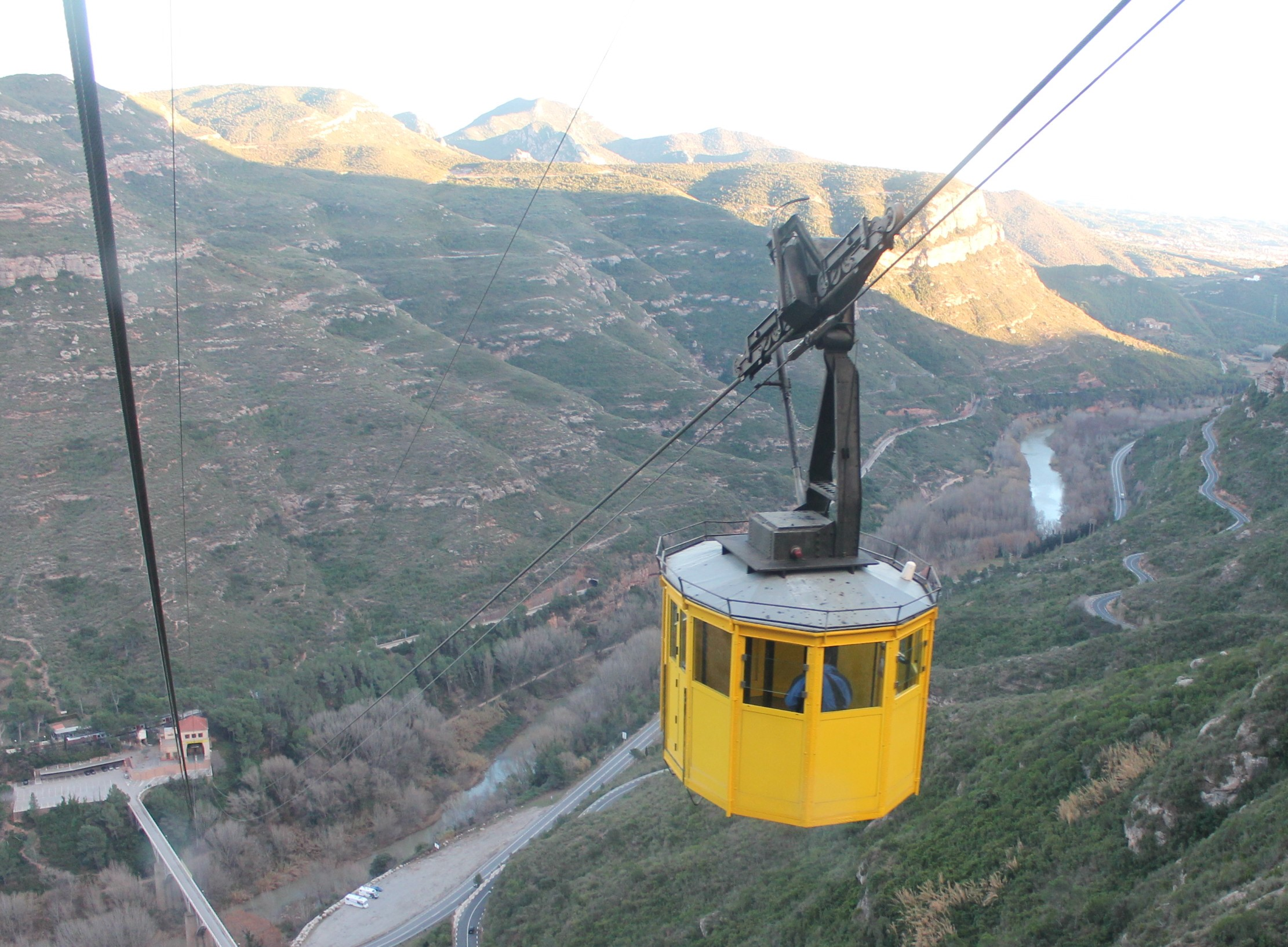 Funicular Aeri de Montserrat (Katalonien-Spanien) Geb. 1930